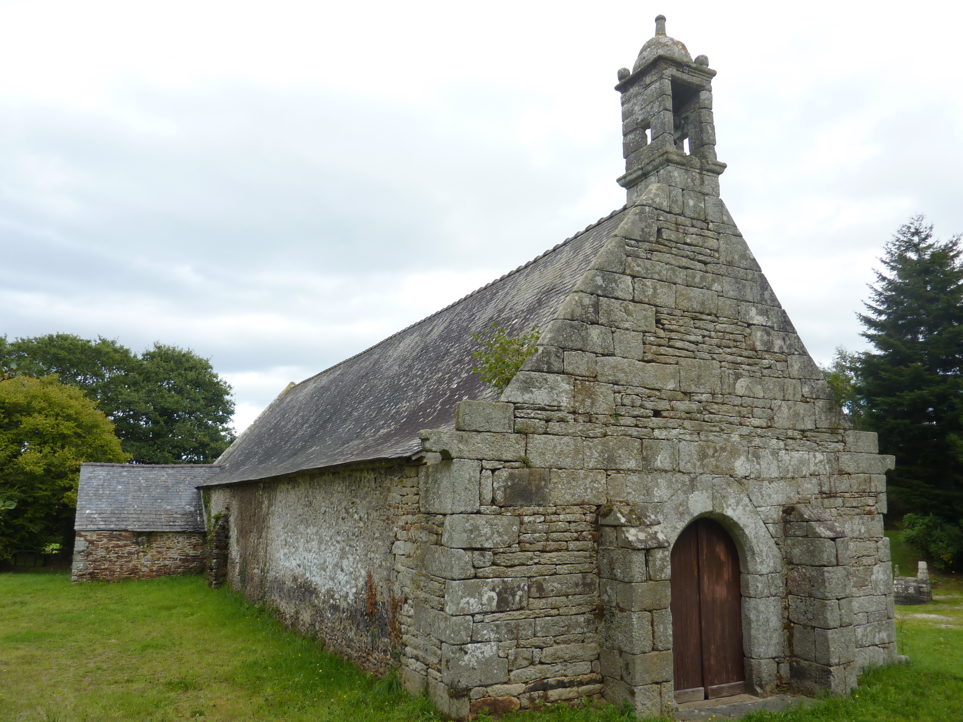 Plouyé: chapelle Saint-Maudez, vue d'ensemble